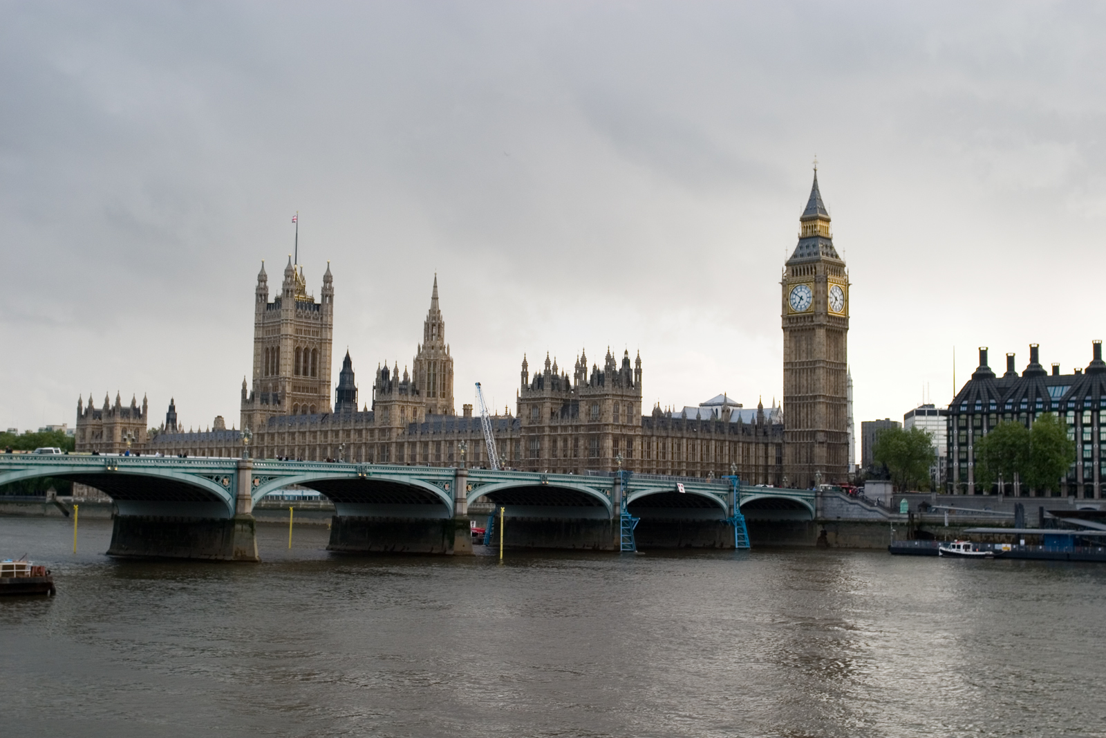 Westminster Bridge, London